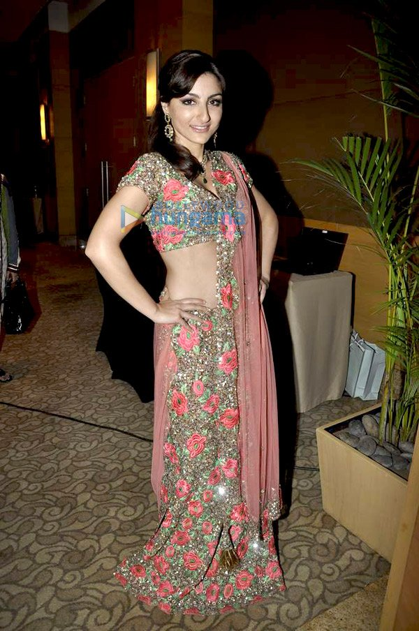 Soha Ali Khan at Beti Gitanjali's show at IIJW 2011